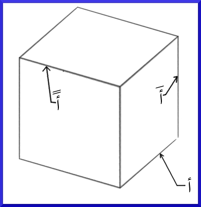 تبيين للضلع الثالث (أً) المراد رسمه